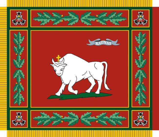 KASP Dariaus ir Girėno apygardos 2-osios rinktinės vėliava